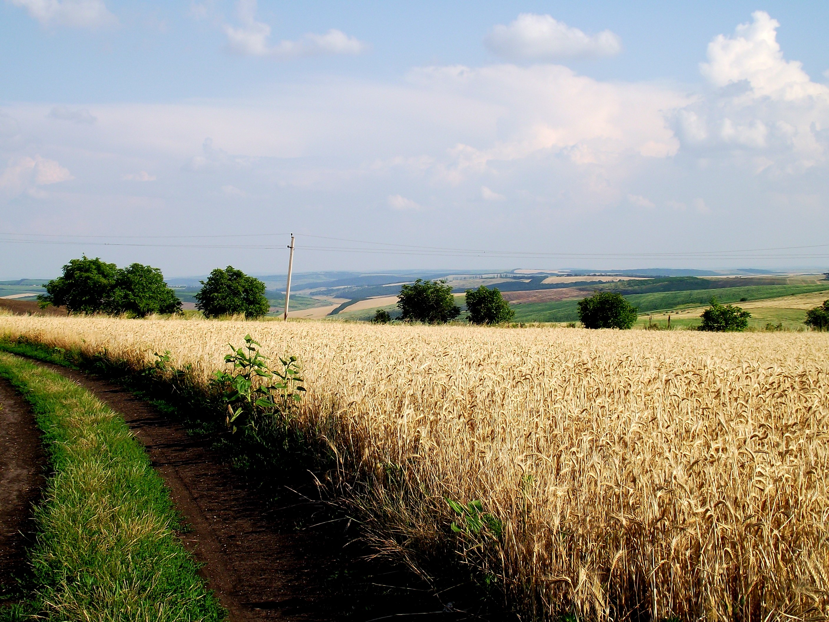 L579, Hîrtop, Moldova